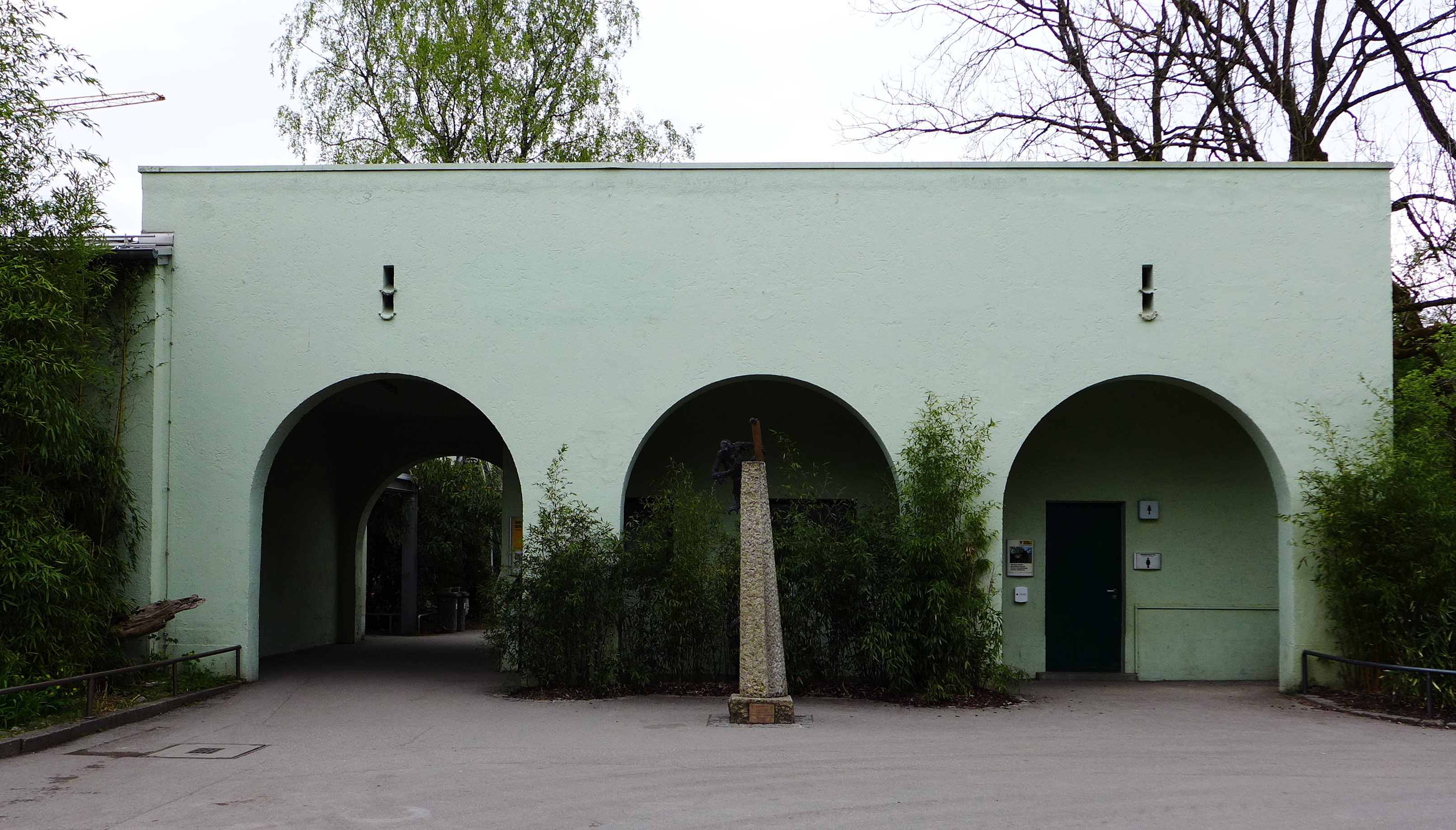 Eingang Aquarium und Menschenaffenstation Tierpark Hellabrunn, München